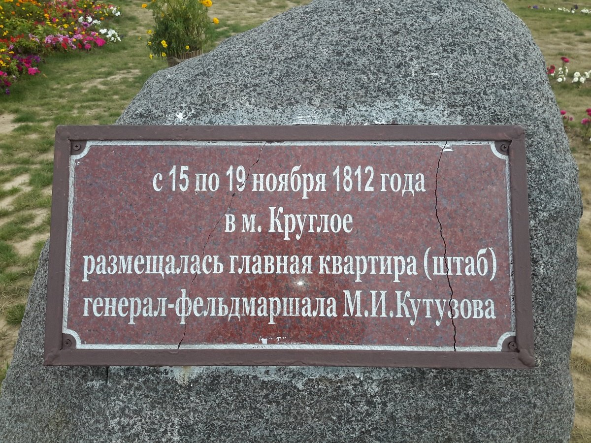 Круглае. Мемарыяльны камень